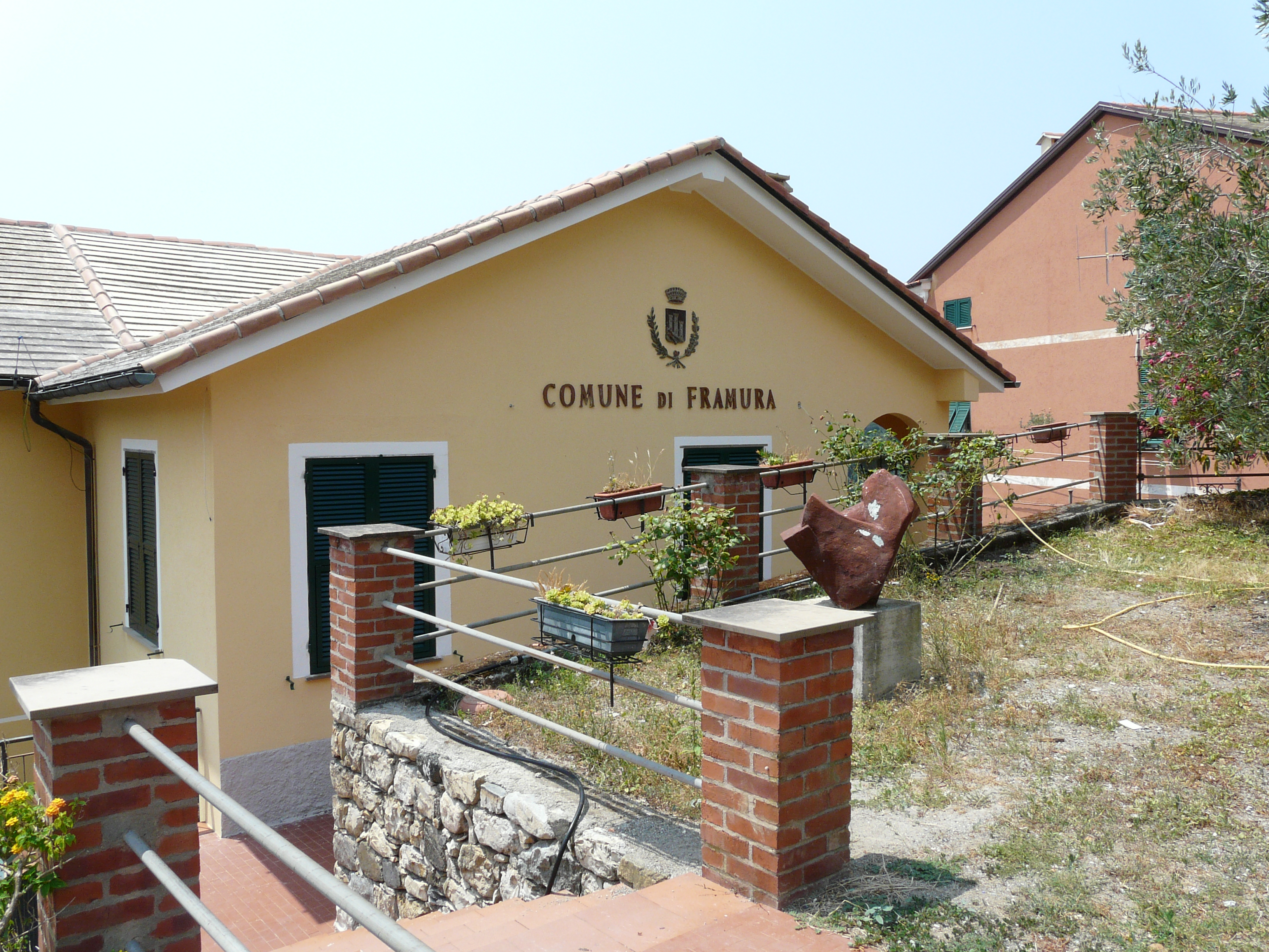 Municipio di Framura, Liguria, Italia